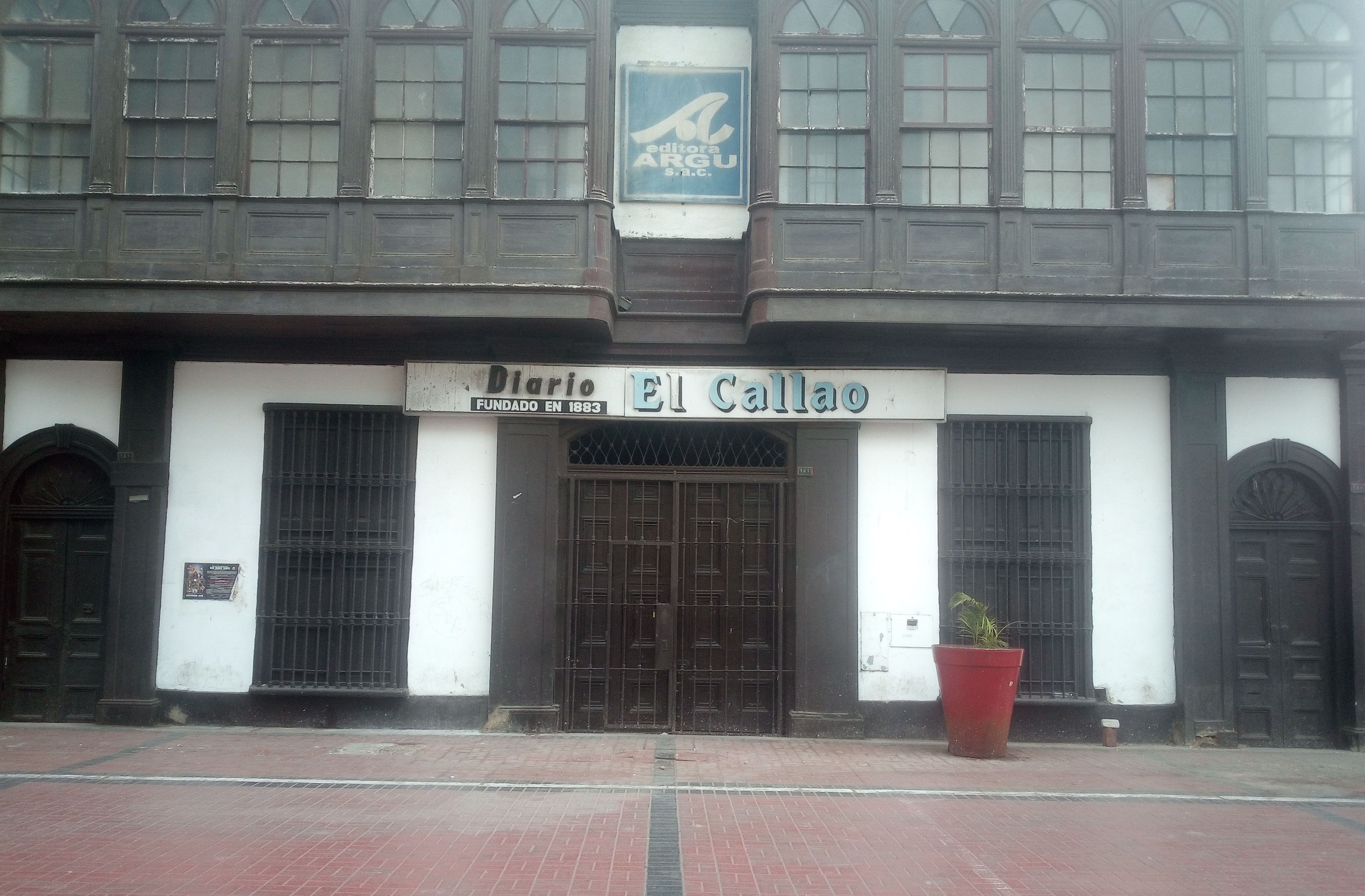 Local del Diario El Callao ubicado en el jirón Pedro Ruiz Gallo 141 (ex Calle Teatro) en el distrito del Callao